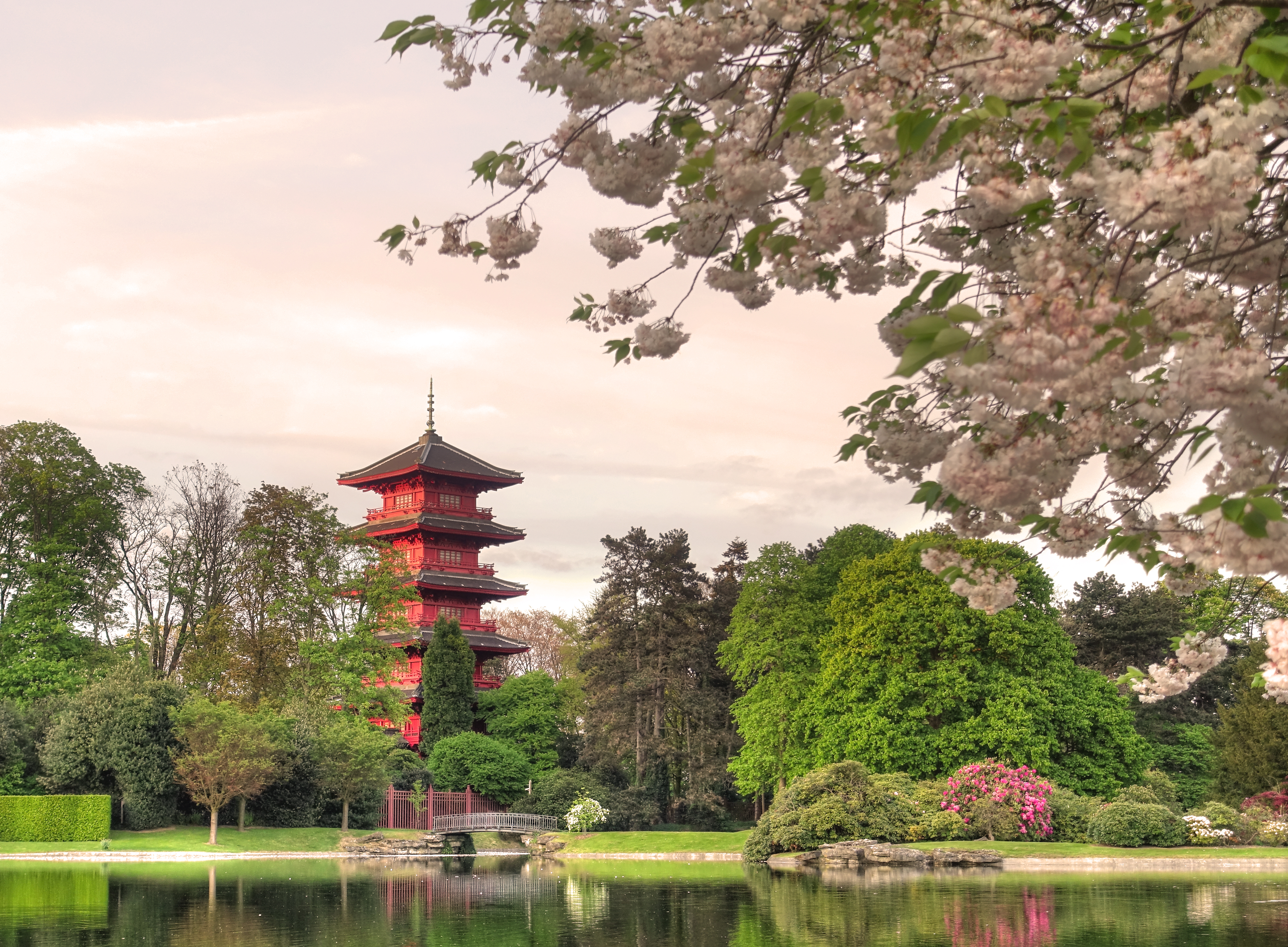 La tour japonaise dans le parc royal de Laeken en soirée